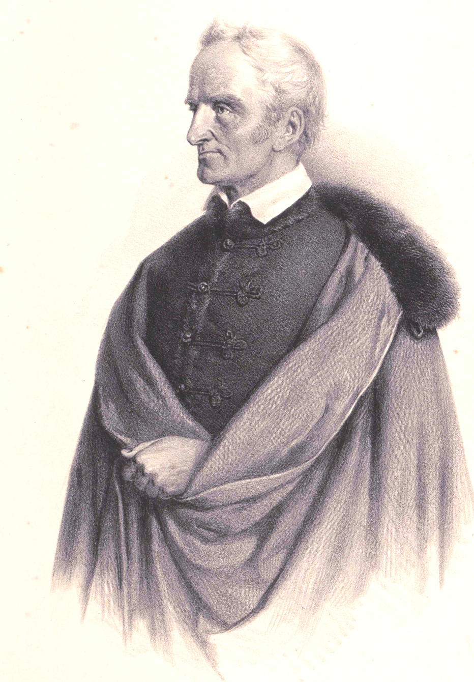 Kazinczi és alsóregmeczi Kazinczy Ferenc (Érsemjén, 1759. október 27. – Széphalom, 1831. augusztus 23.), magyar író, költő, a nyelvújítás vezéralakja, a Magyar Tudományos Akadémia tagja